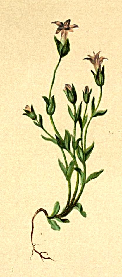 Gentiana tenella (Gentianella tenella)